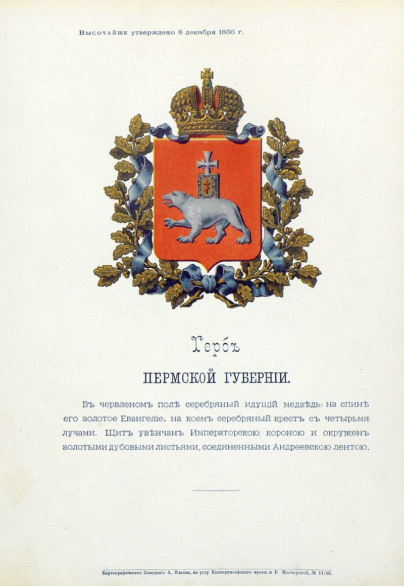 Official Russian Empire coat of arms Perm Governorate. Герб Российской Империи Пермской губернии с официальным описанием в Гербовнике Бенке. Утверждён Императором Всероссийским Александром Вторым в 1878 году.